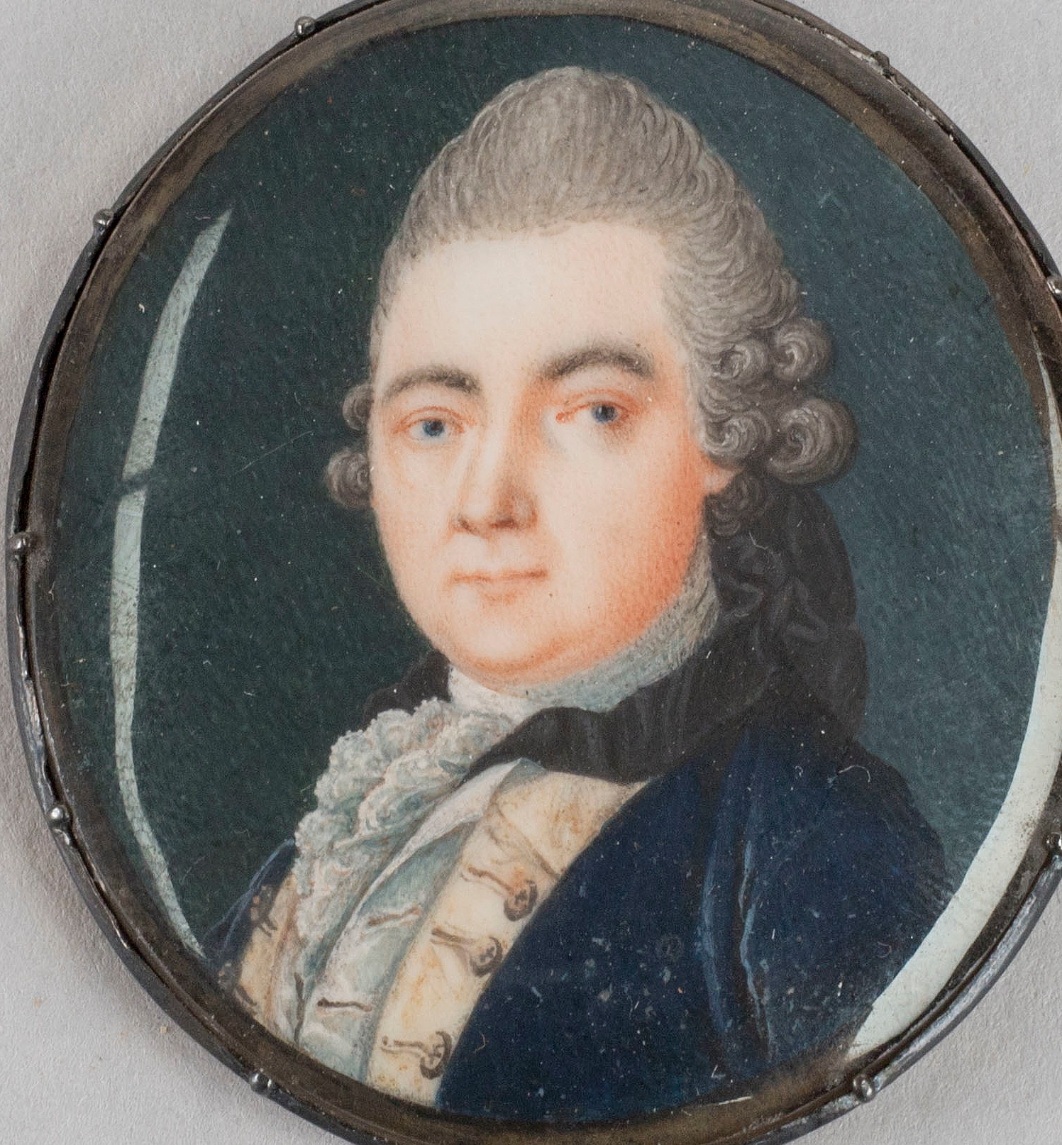 Anders Sparrman (1748-1820). Sparrman var lärjunge till Carl von Linné. År 1765 följde han med på en expedition till Kina som skeppsläkare. År 1772 anslöt han sig till James Cooks andra resa och utforskade Australien, Oceanien och Sydamerika. På Linnés rekommendation reste han 1772 till södra Afrika där han studerade naturlivet och befolkningen. År 1787 deltog han i en resa till Västafrika. Porträttet är registerat i Svenska Porträttarkivet SPA 1973:272